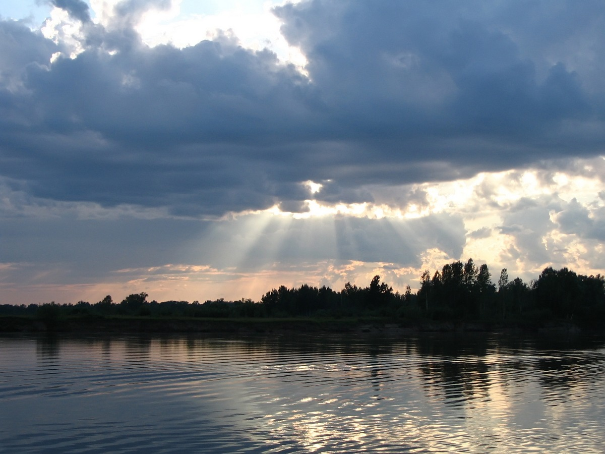 Чулым в Асиновском районе